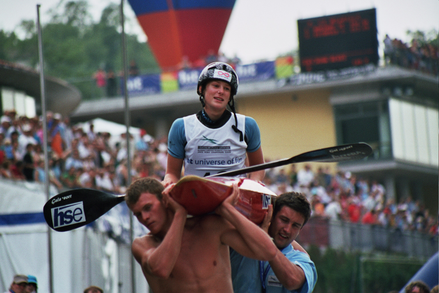 Solkan 2006